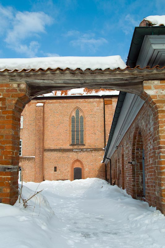 Blick entlang der Westfront auf den jetzigen Eingang zum Kirchenraum